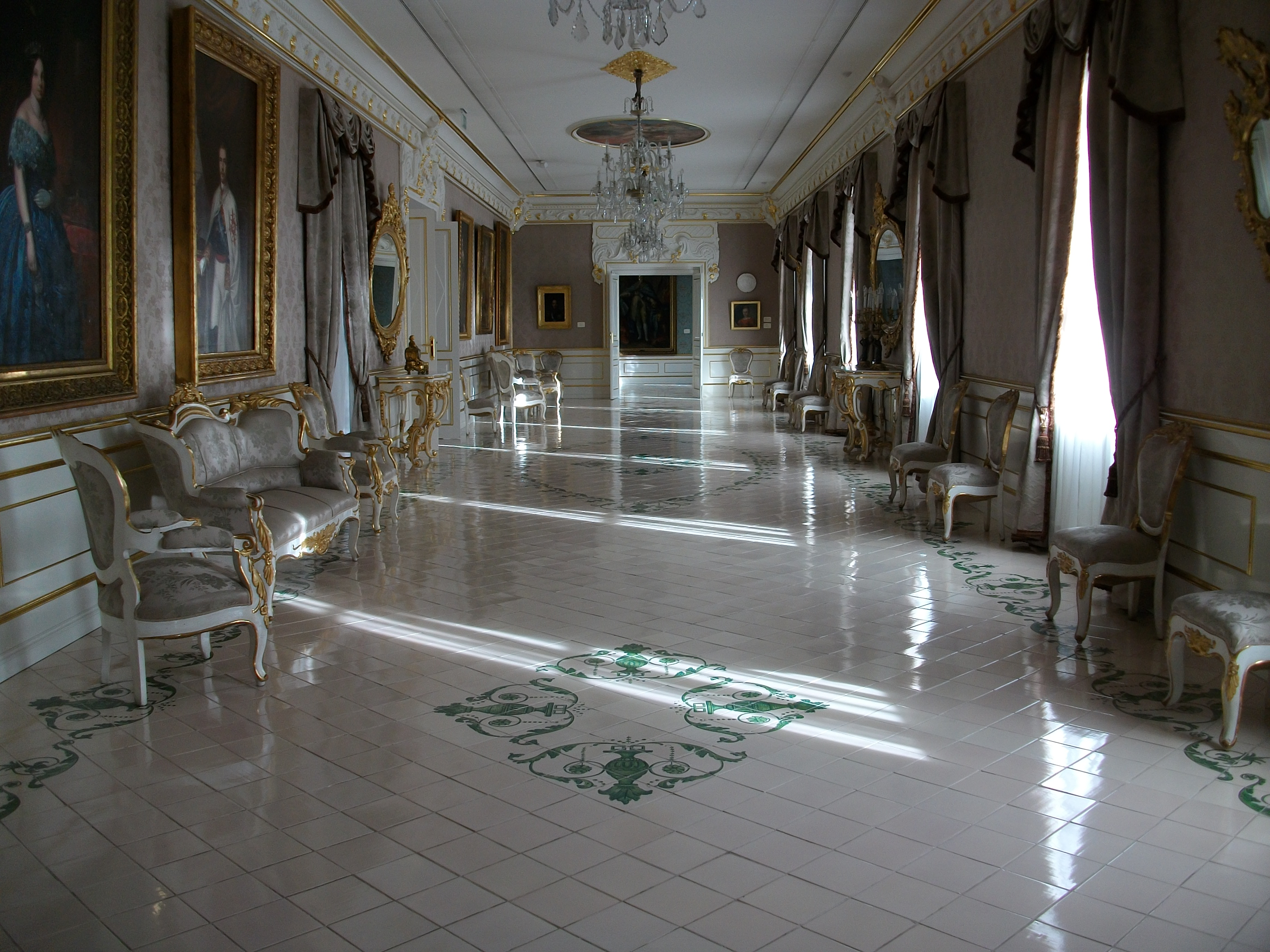 Reconstrucció historicista del saló de ball del Palau de Cervelló, València.